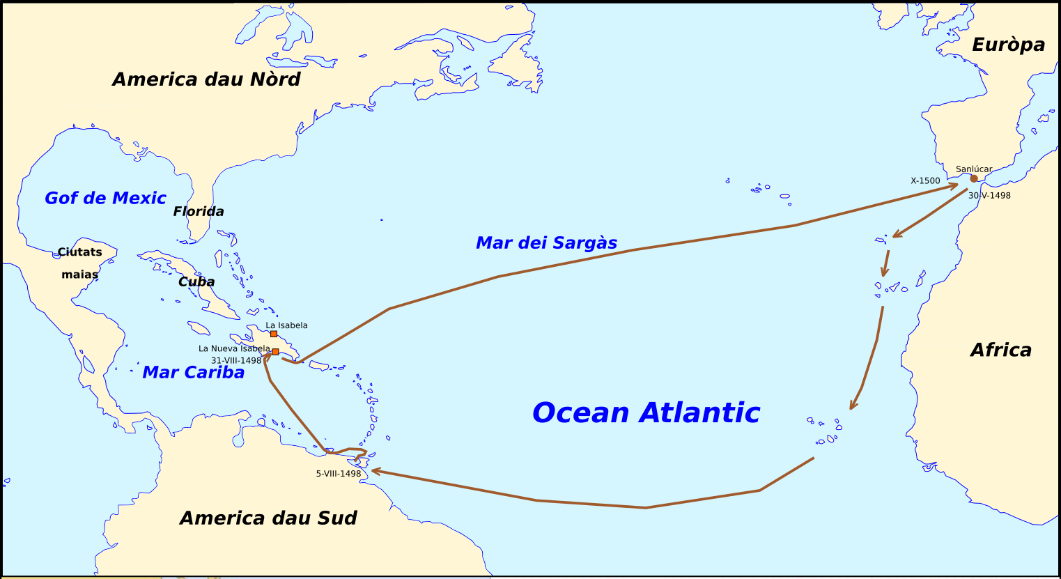 Trajècte de la tresena expedicion de Cristòl Colomb.